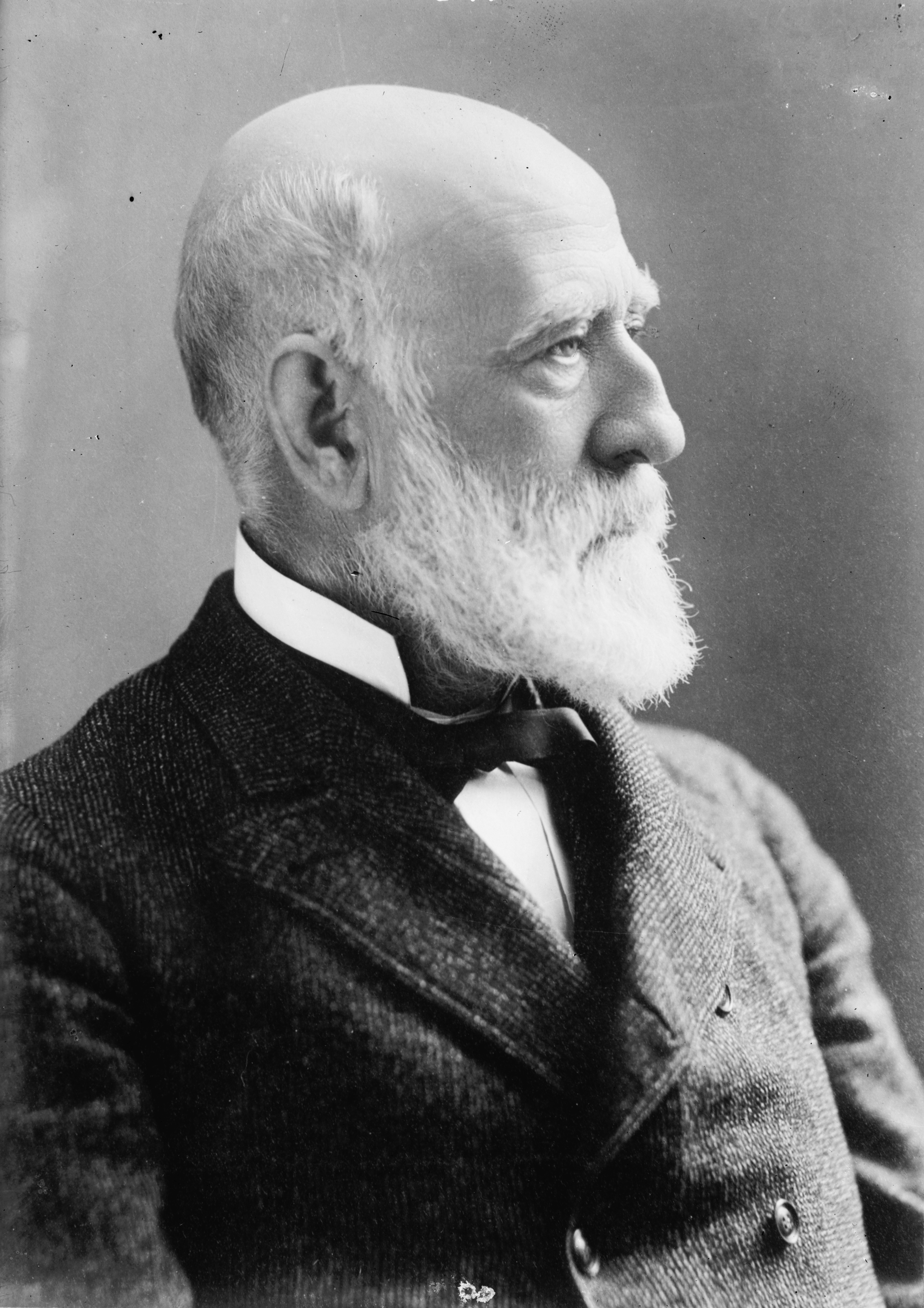 George F. Edmunds